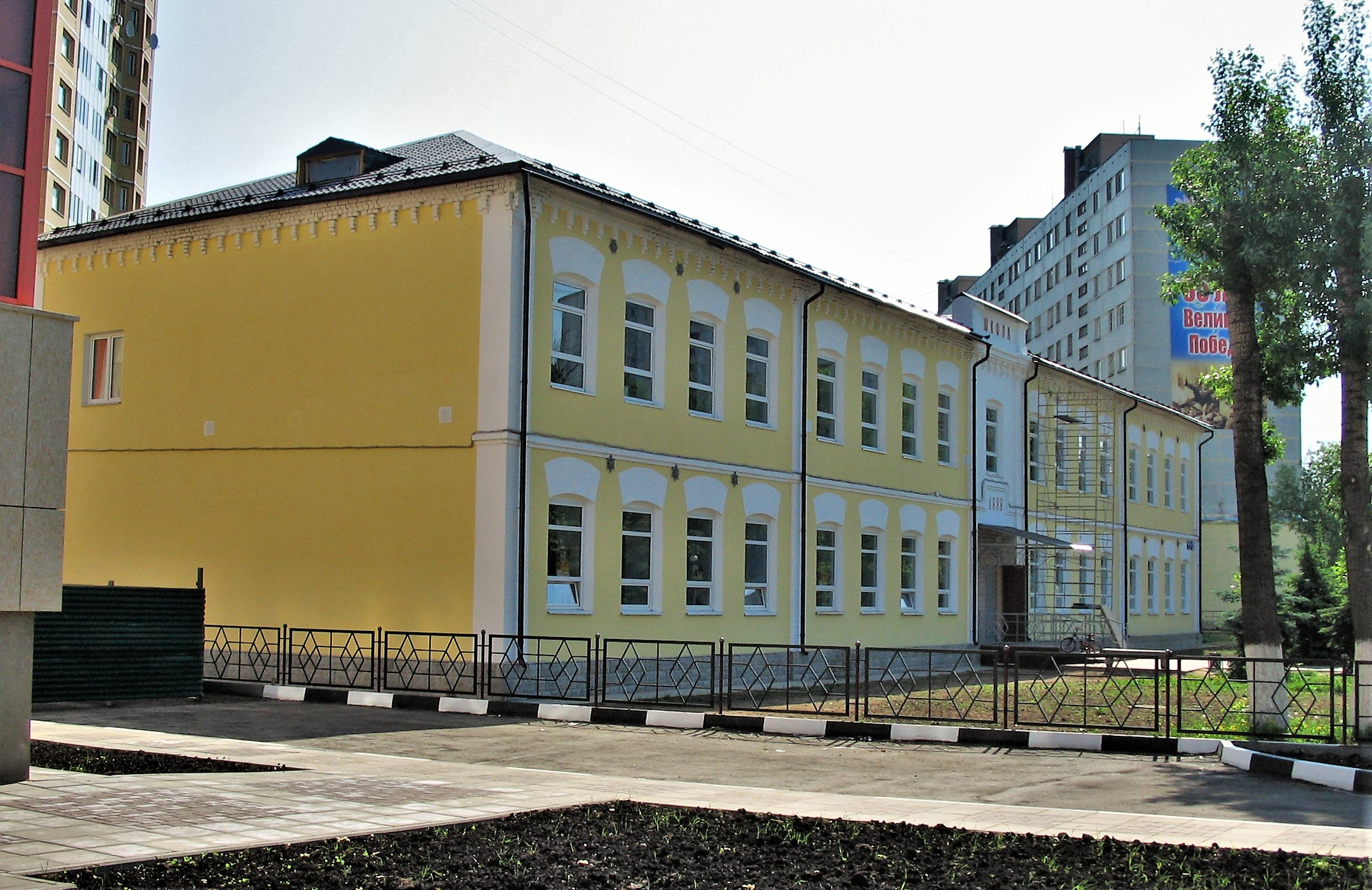 Детско-юношеская спортивная школа города Реутова. Здание построено в 1888 году.